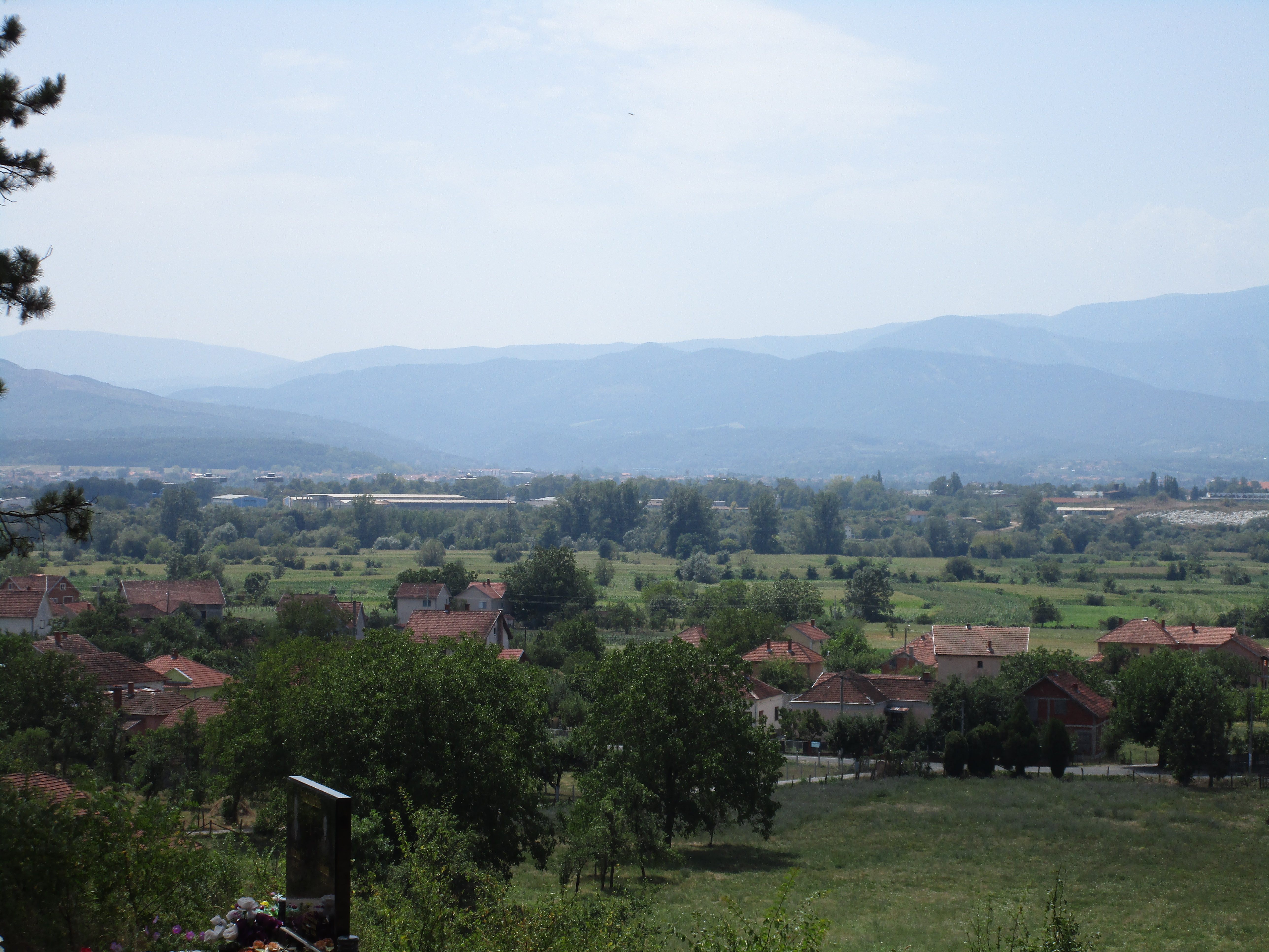 Srpski (latinica): Sirča